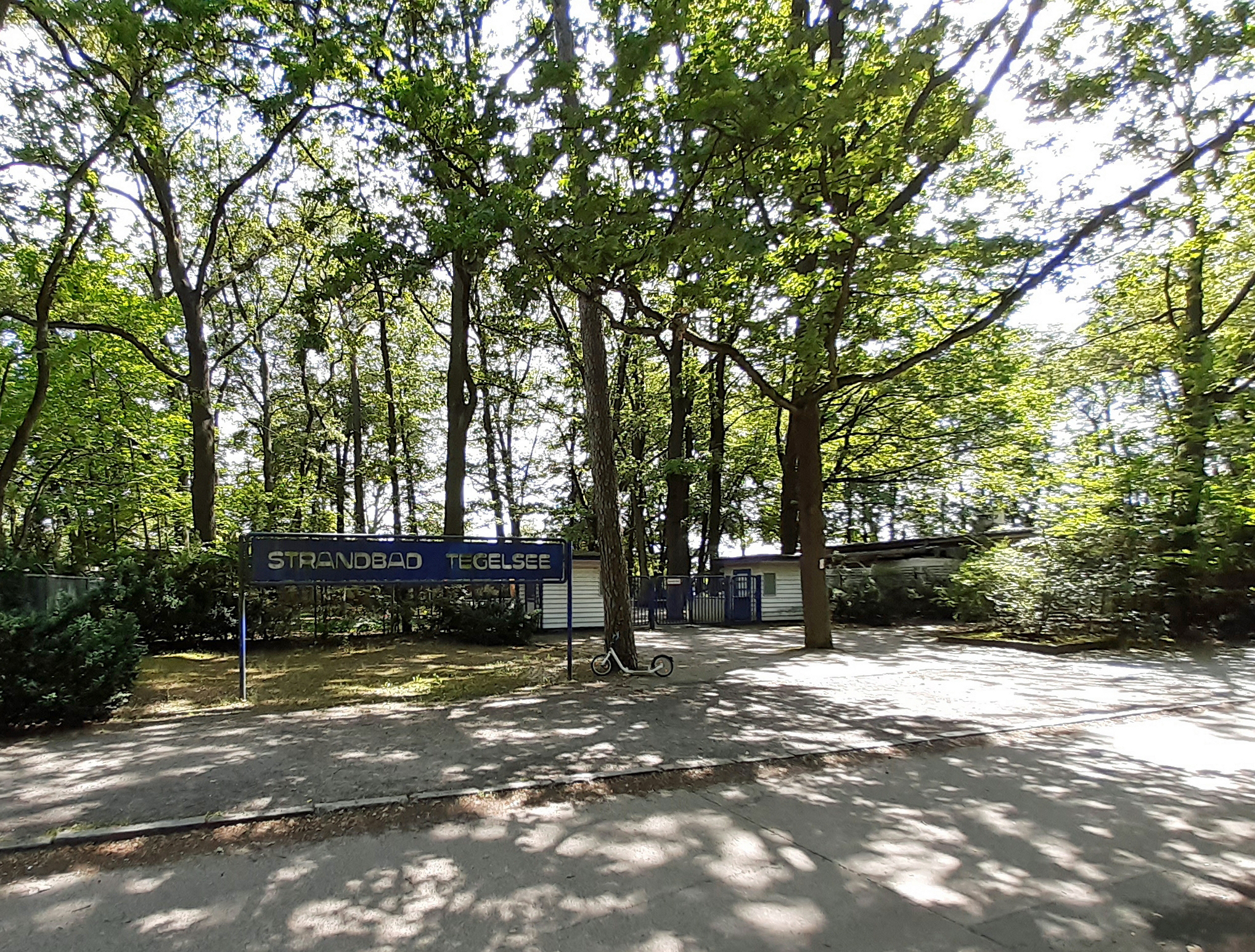 Das seit 2016 geschlossene "Strandbad Tegelsee", am Tegeler See in Berlin.